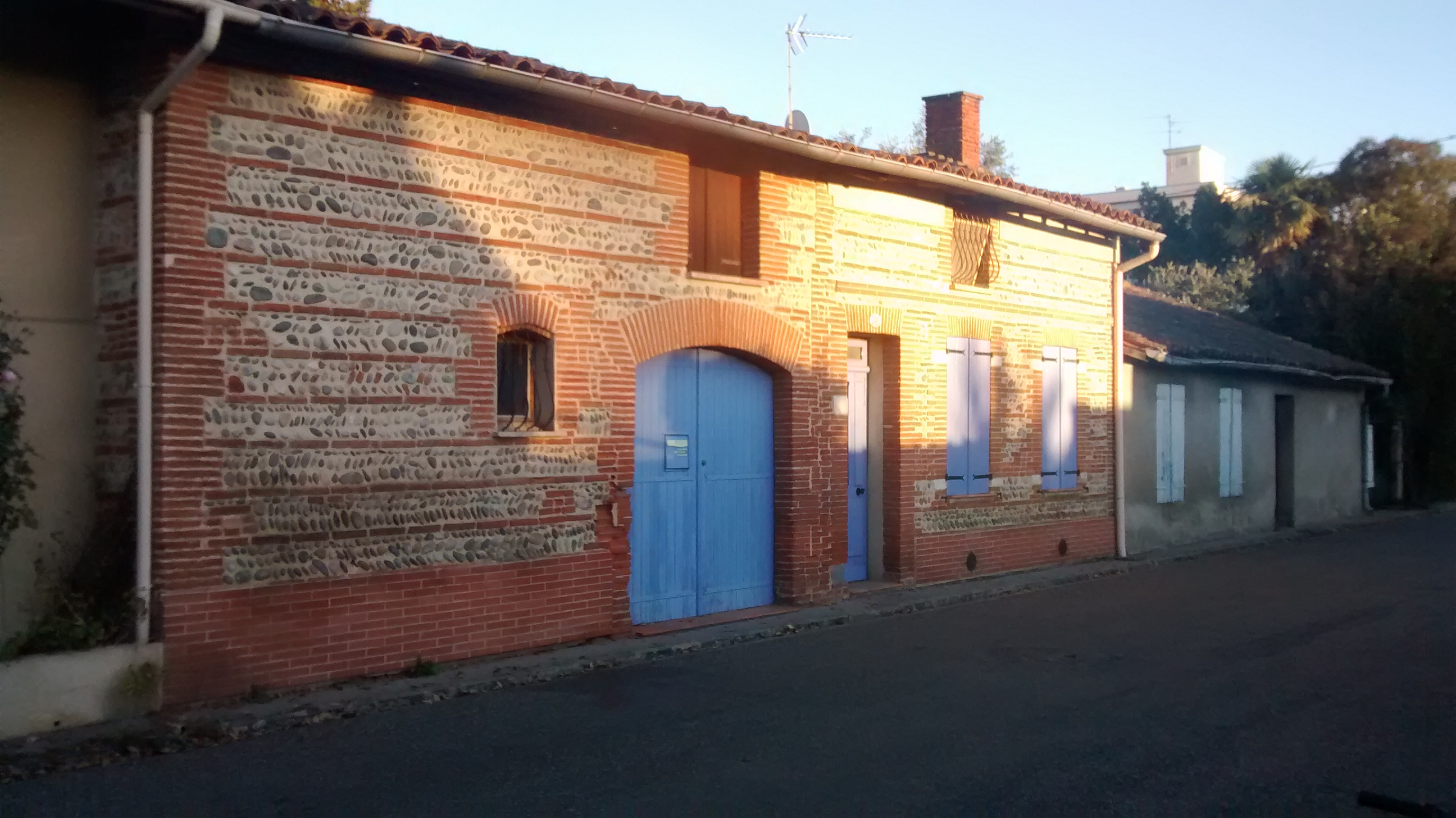 Maison typique Toulousaine début 1900. Inventoriée, mais non classée, et détruite aujourd'hui. Au fil des ans, les traces du passé s'estompent...